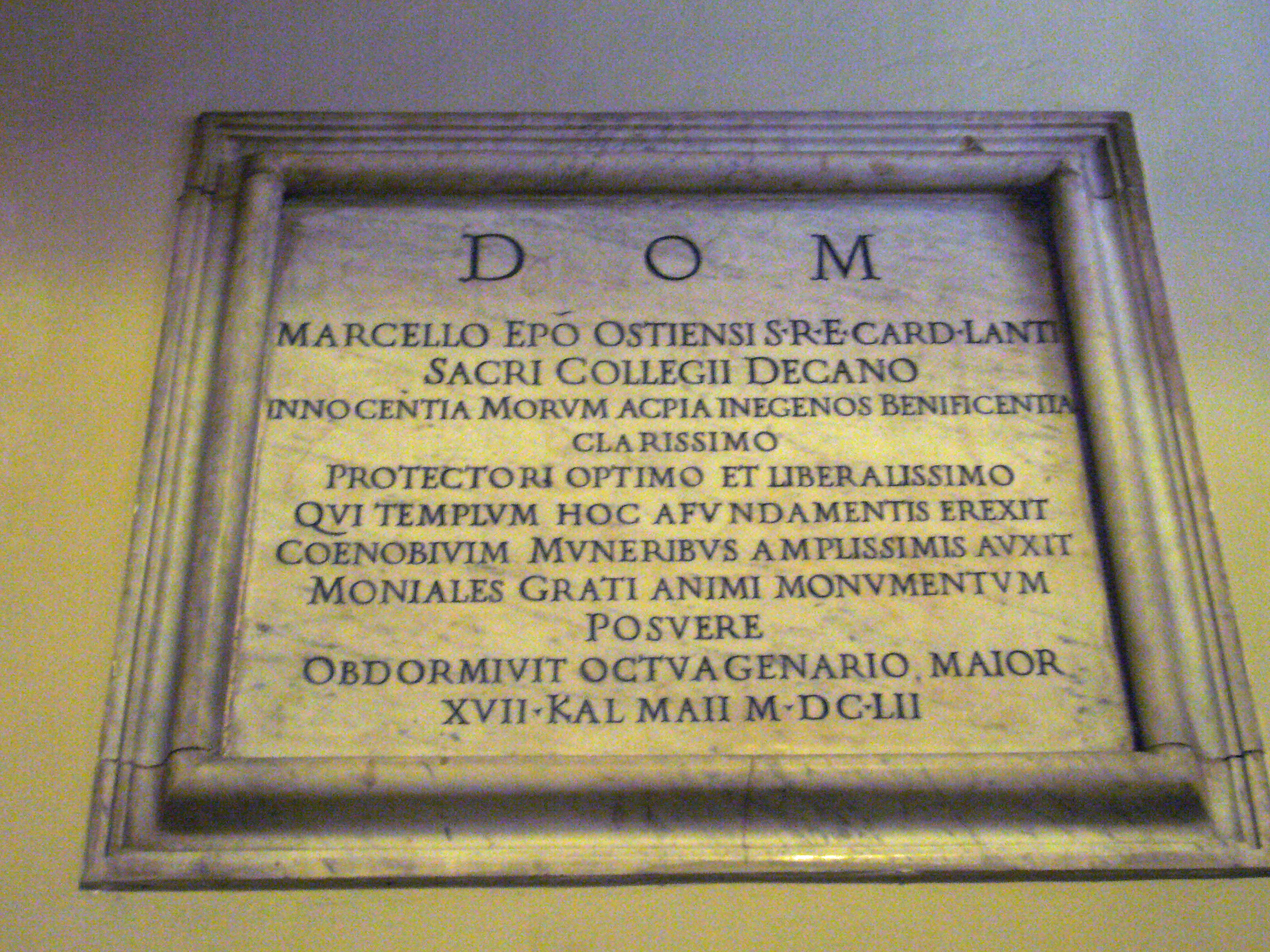 Roma, san Giuseppe a Capo le Case. Lapide del cardinale Marcello Lante (1652)